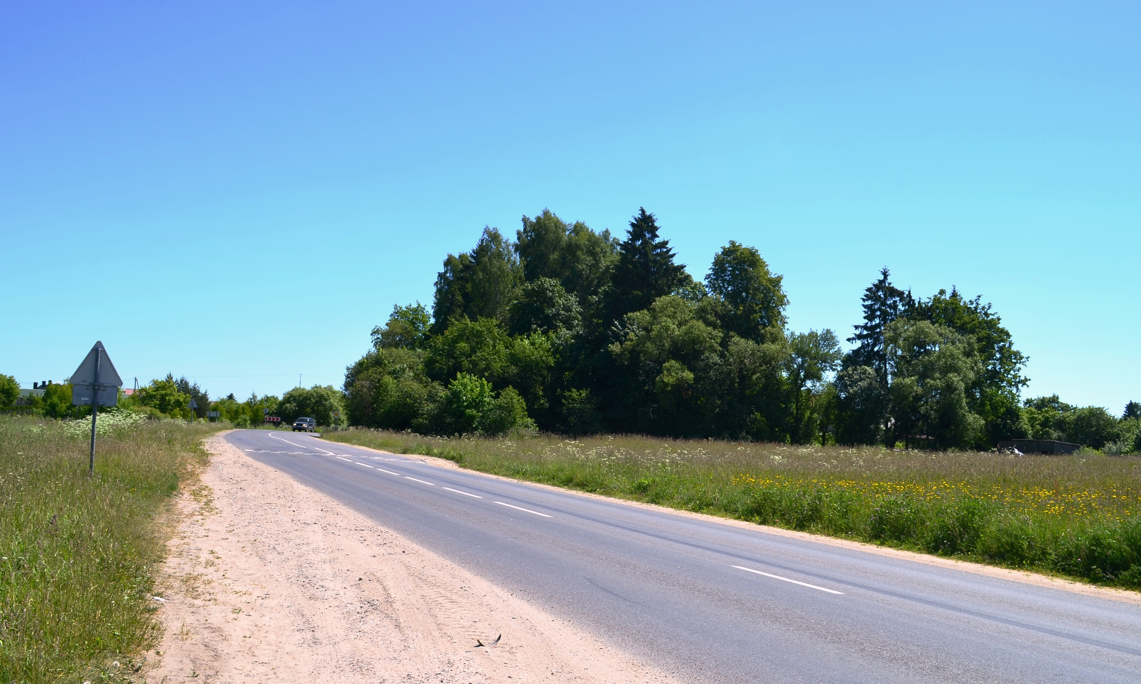 Avižienių piliakalnis iš šiaurės vakarų, Vilniaus raj.